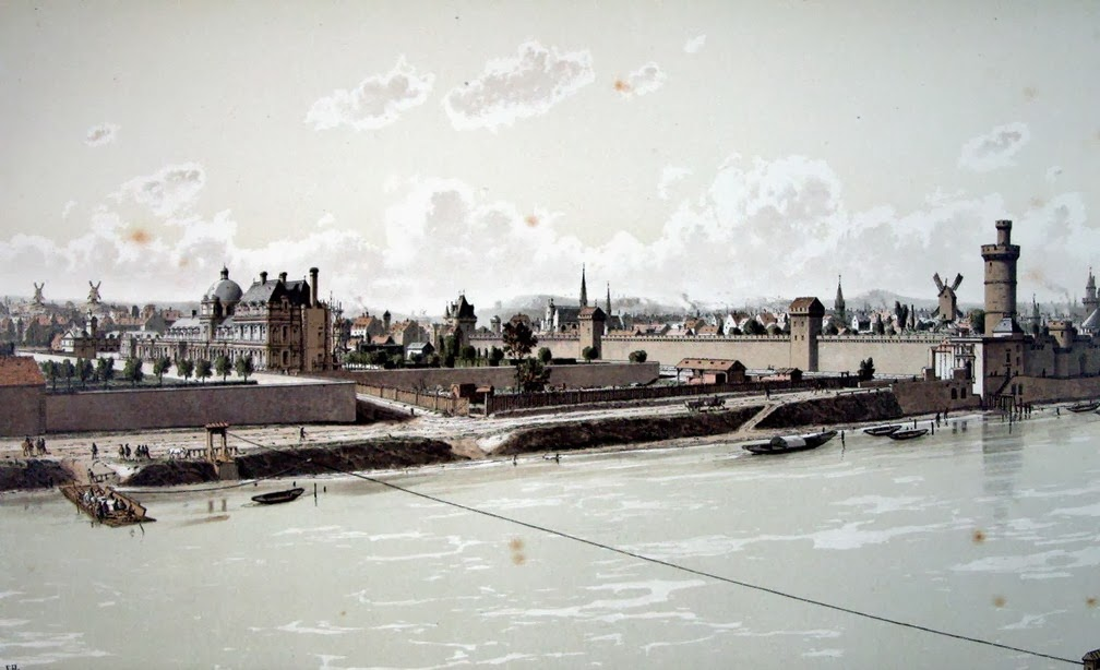 EL Palacio de las Tullerías hacia 1570, según un gravado de Theodor Hoffbauer de finales del siglo XIX.